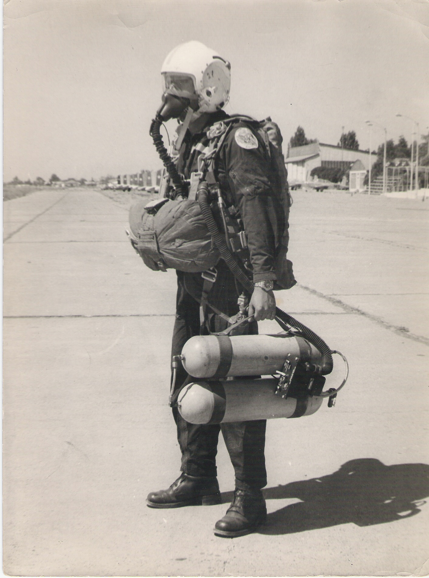 Teniente Leonardo Antonucci Salazar en la Base Aérea El Bosque el 22 de Marzo de 1975, desnitrogenizando en tierra antes de realizar el primer salto HALO en Chile.